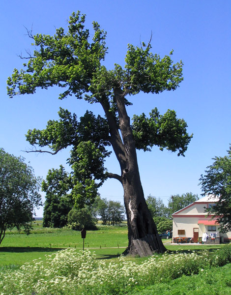 Lípa u Gigantu na louce před čp. 35.